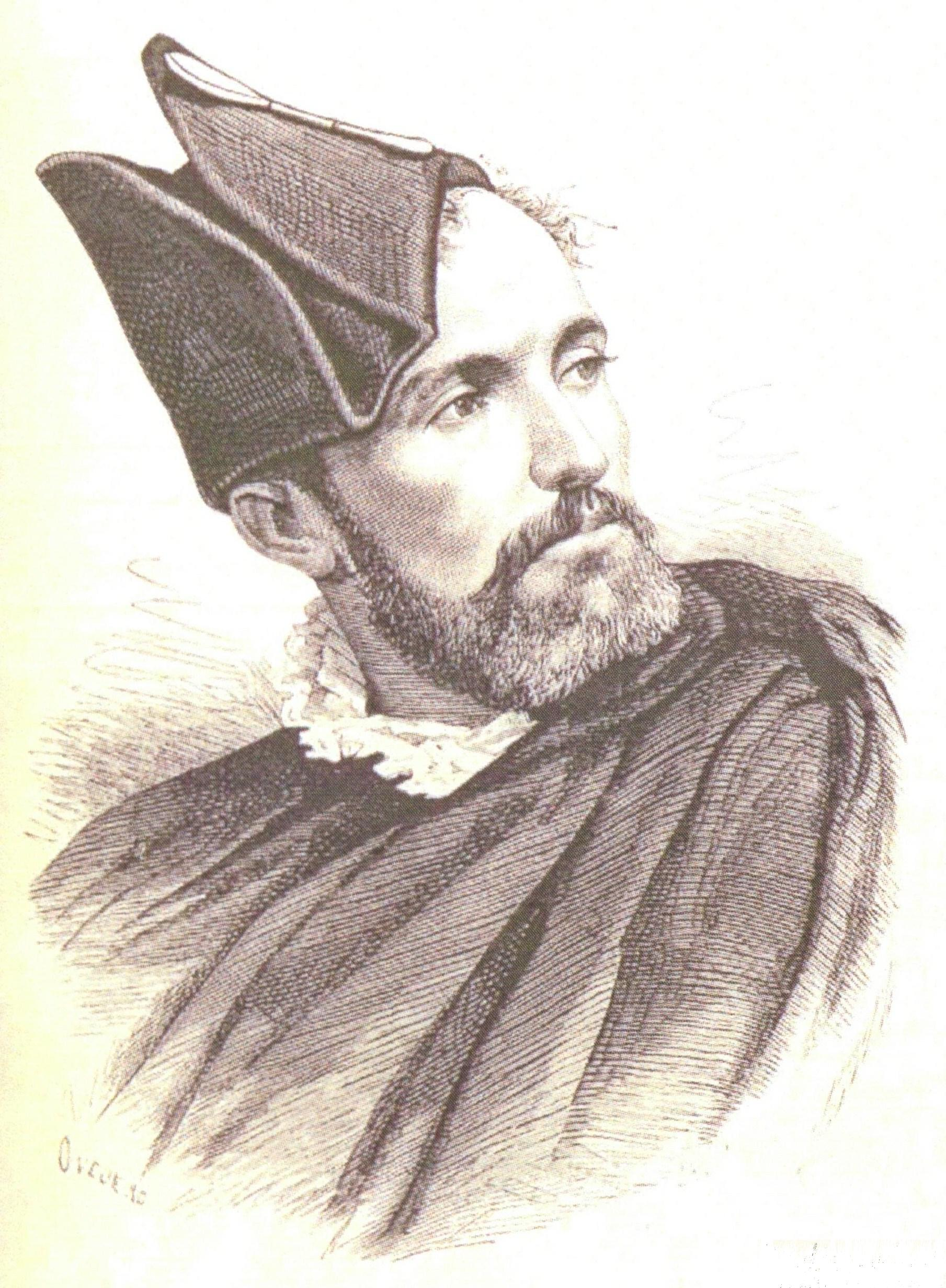 Portrait de D. Ildefonso de Zabaleta, président de l'Estudiantina Espagnola venue à Paris en mars 1878 participer au Carnaval.